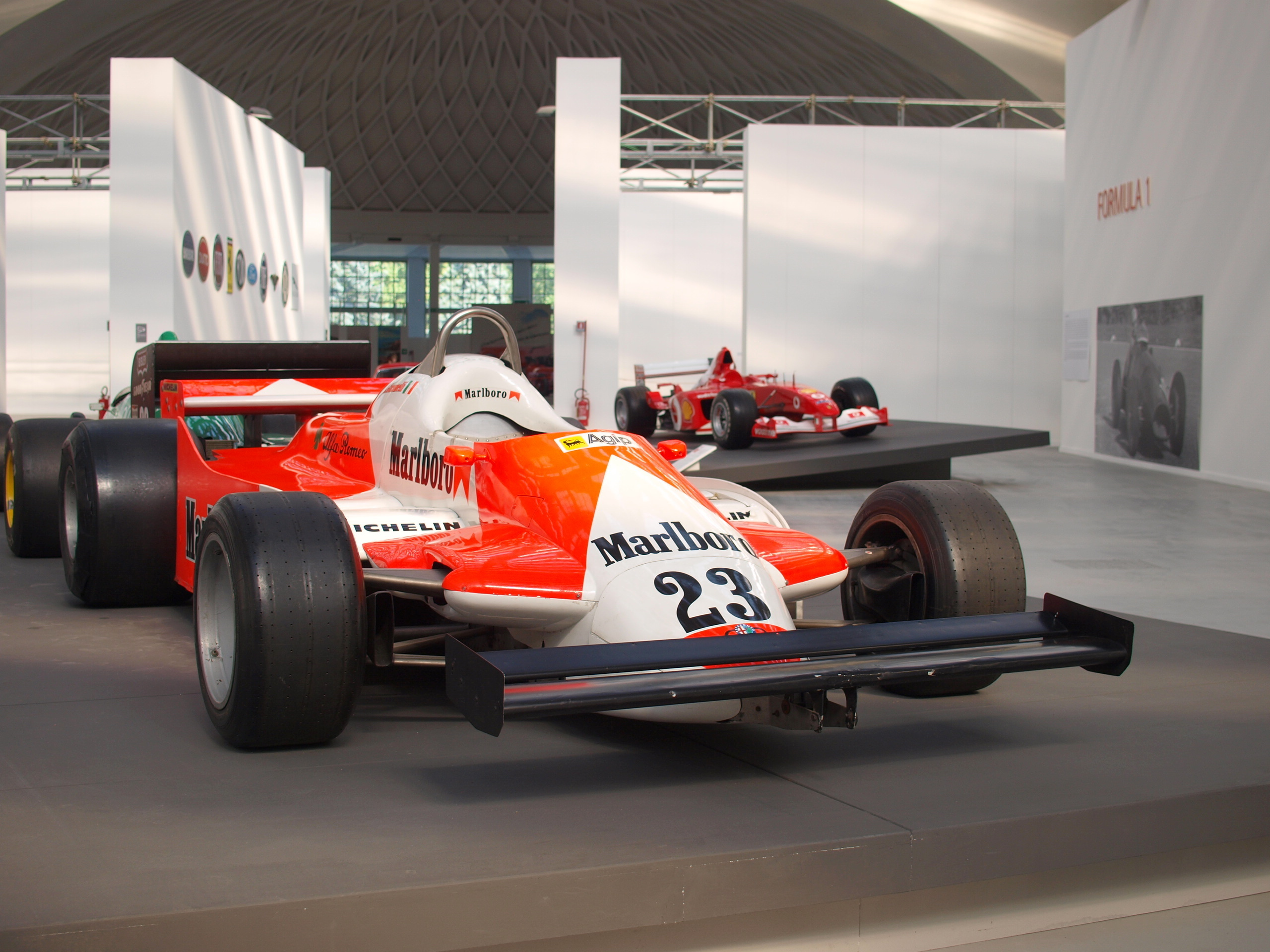 L'evoluzione dell'automobile Alfa Romeo 179 F-1